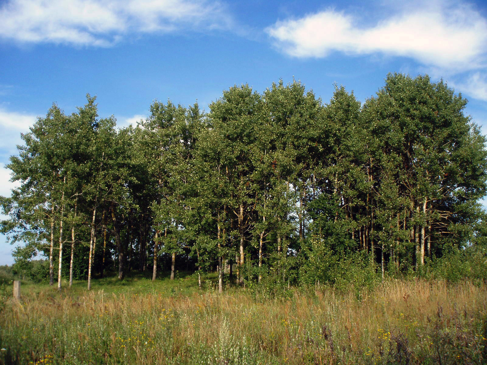 Kražiškių kapinaitės Mažeikių rajone